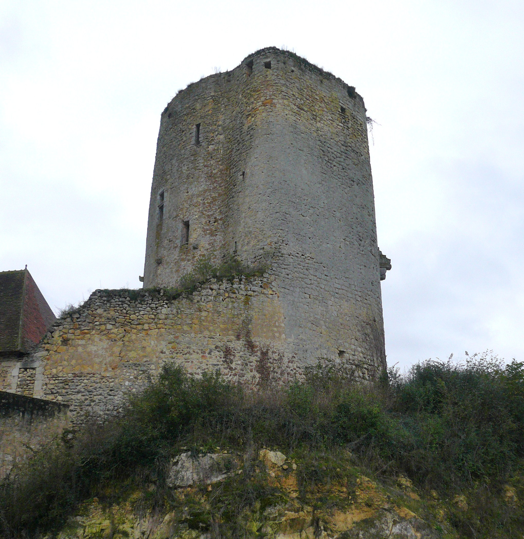 Vestiges du donjon du château du Châtelier, commune de Paulmy, Indre-et-Loire, Centre, France.